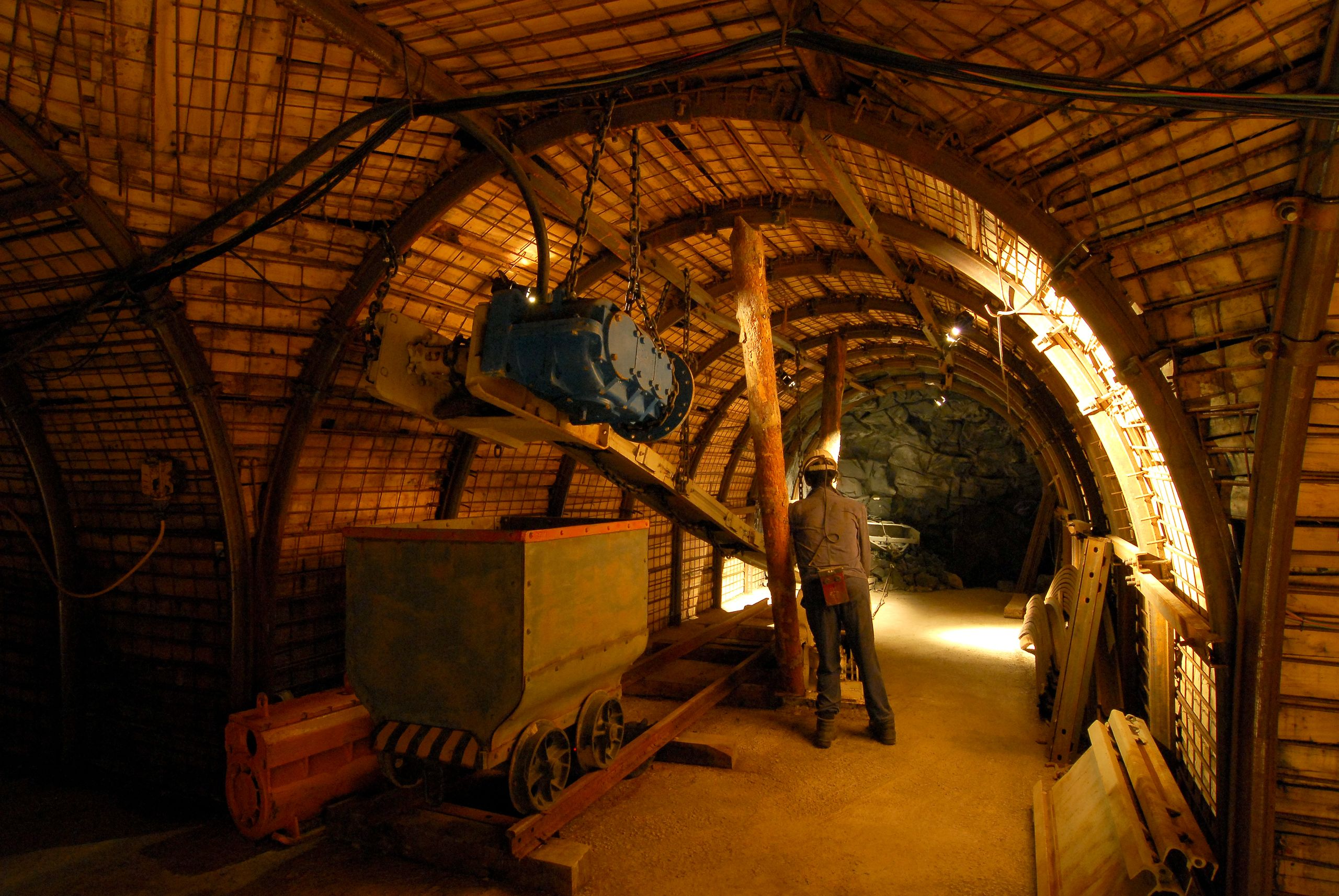 MINA IMAGEN MUSEO DE LA MINERIA DE PUERTOLLANO